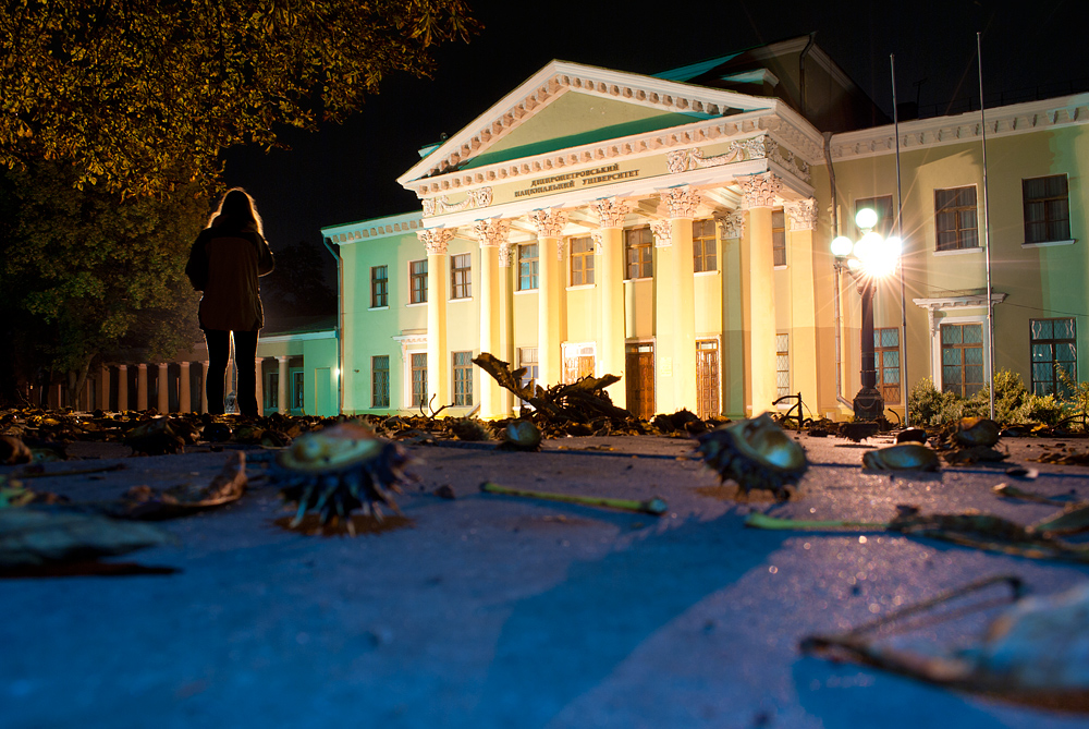 Палац (мур.), Дніпропетровськ, парк ім.Т.Г.Шевченка